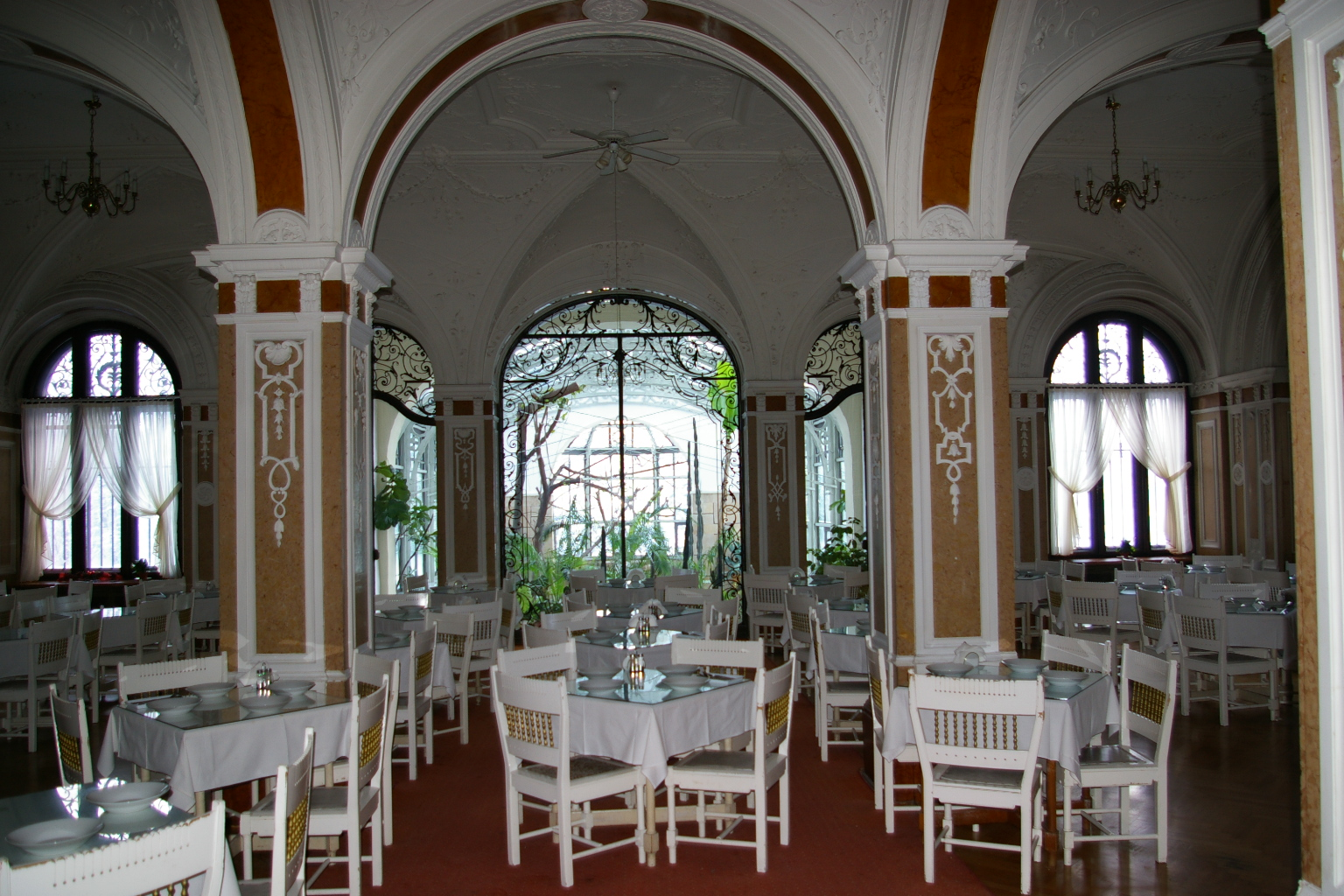 Moszna; jadalnia w głębi oranżeria.